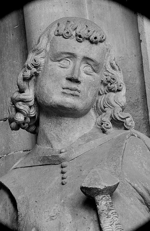 Original image description from the Deutsche FotothekDetail der Stifterfigur Hermann im Naumburger Dom St. Peter und Paul